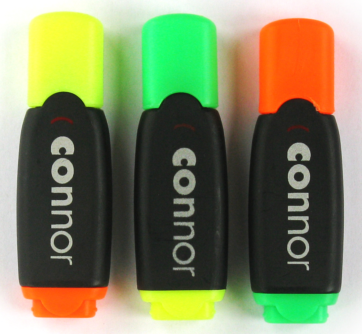 Textmarker